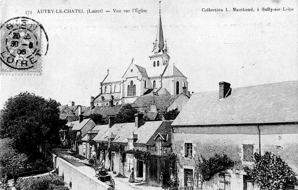 Vue sur l'église, Autry-le-Châtel, Loiret, France